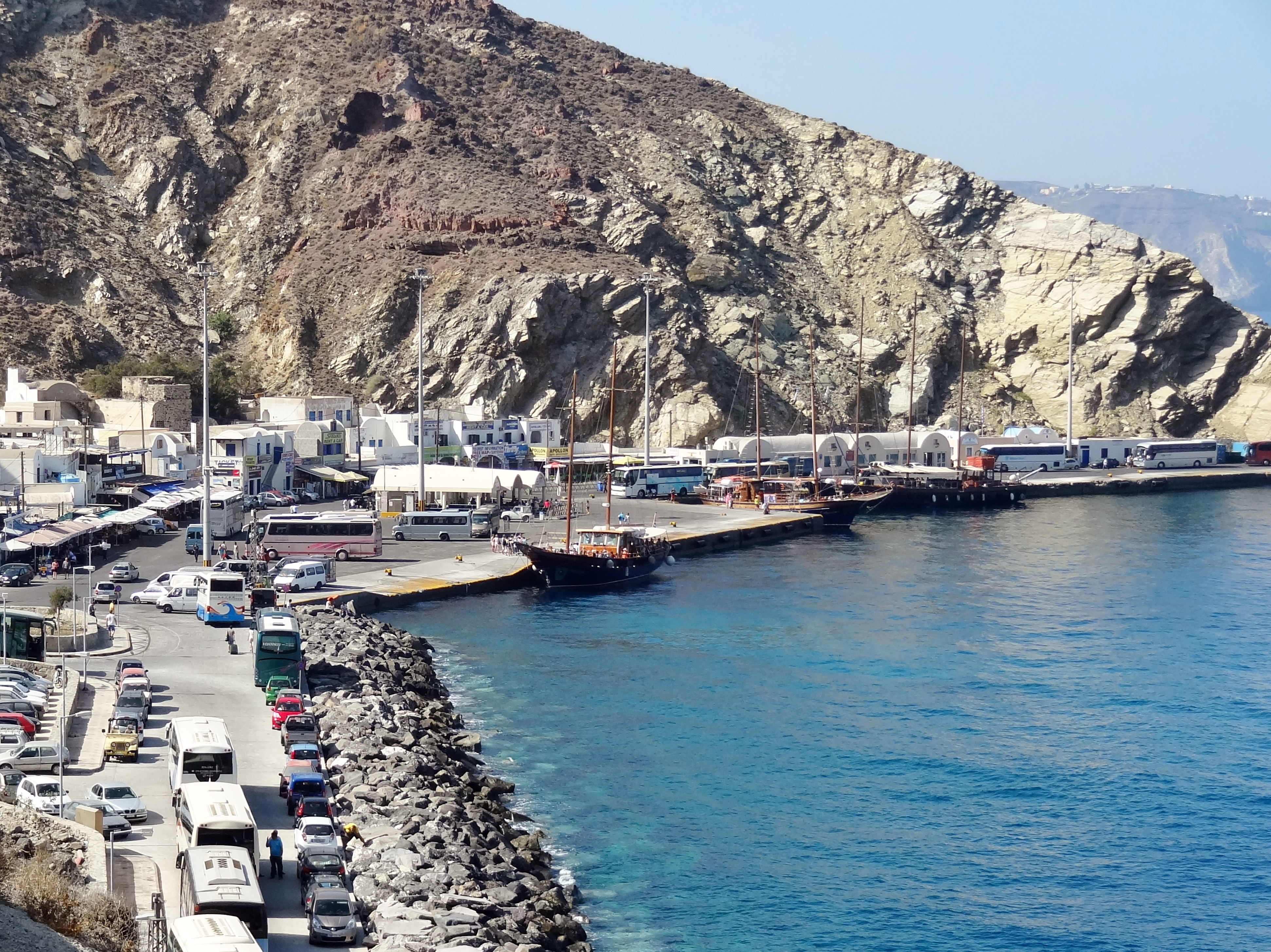 Hafen von Athinios an der Caldera von Santorin, Kykladen, Griechenland